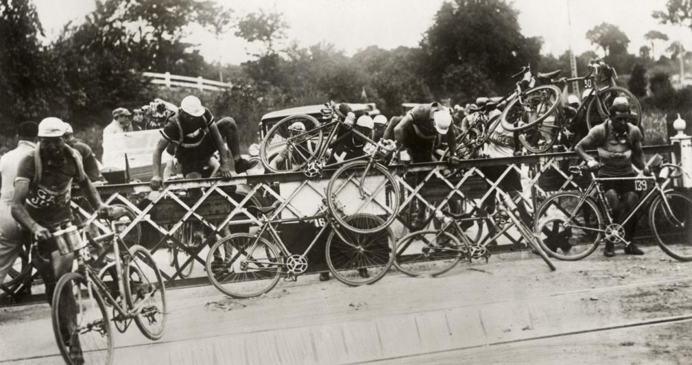 Spaarnestad Photo, SFA022004648 Wielrenners kunnen niet wachten en klimmen over de gesloten slagbomen van een bewaakte overweg. Tour de France. Frankrijk, juli 1932. Plaats onbekend. Collectie SPAARNESTAD PHOTO/Het Leven Cyclists can't wait crossing the closed barrier of a railway crossing. Tour de France, July 1932. Location unknown. Voor meer informatie en voor meer foto’s uit de collectie van Spaarnestad Photo, bezoek onze Beeldbank: U kunt ons helpen onze kennis van de fotocollecties te verrijken door tags en commentaren toe te voegen. Herkent u mensen of locaties of heeft u een bijzonder verhaal te vertellen bij één van de foto’s, laat dan een reactie achter (als u ingelogd bent bij Flickr) of stuur een mailtje naar: You can help us gain more knowledge on the content of our collection by simply adding a comment with information. If you do not wish to log in, you can write an e-mail to